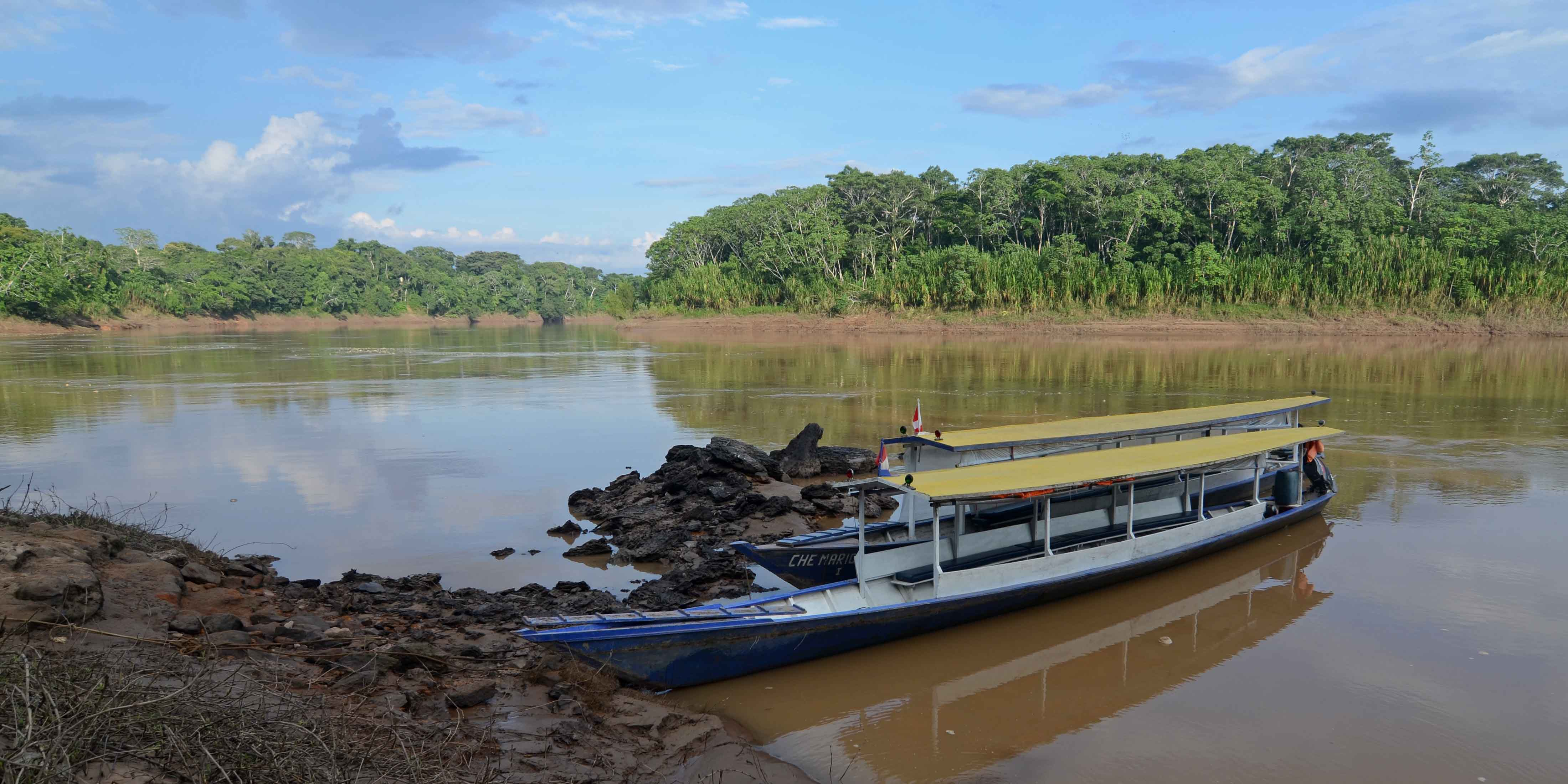 Madre de Dios, Peru